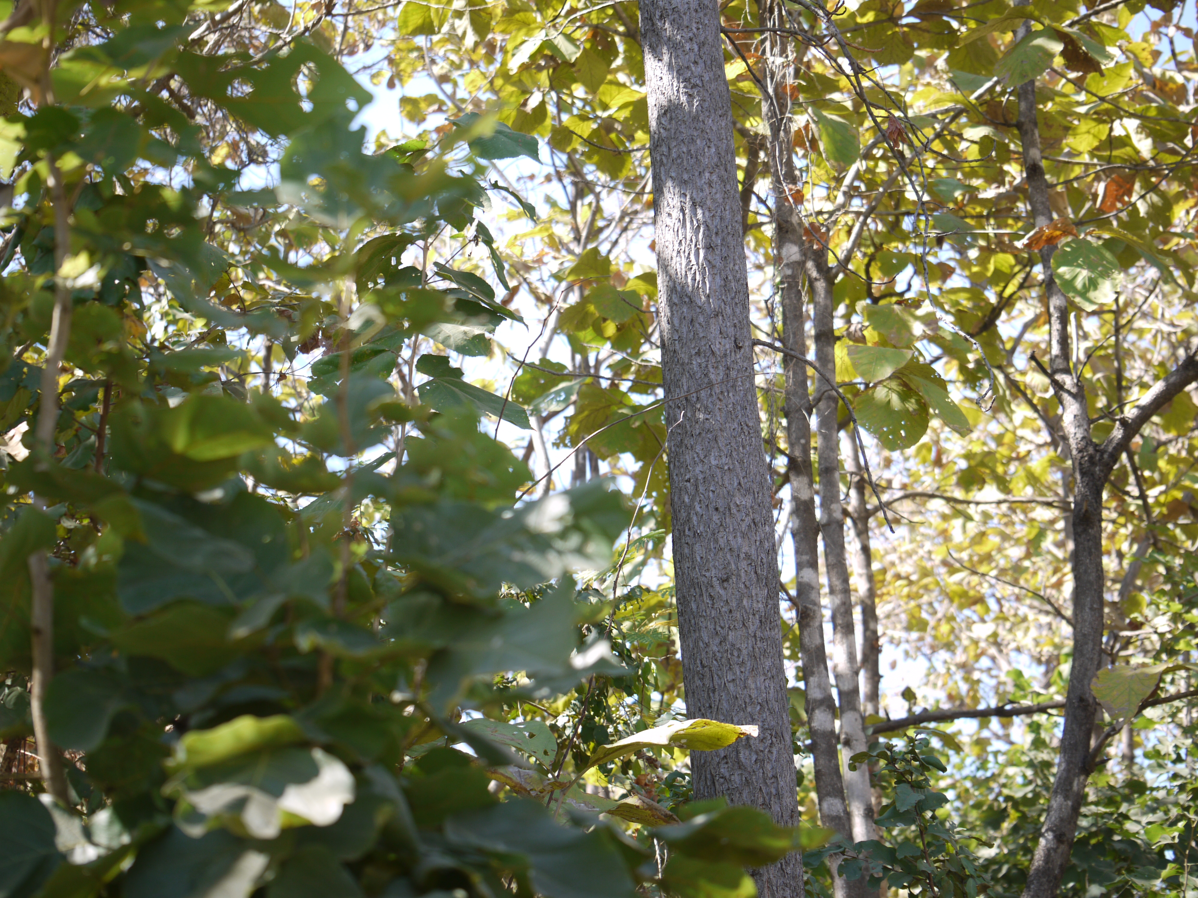 Cochlospermum religiosum